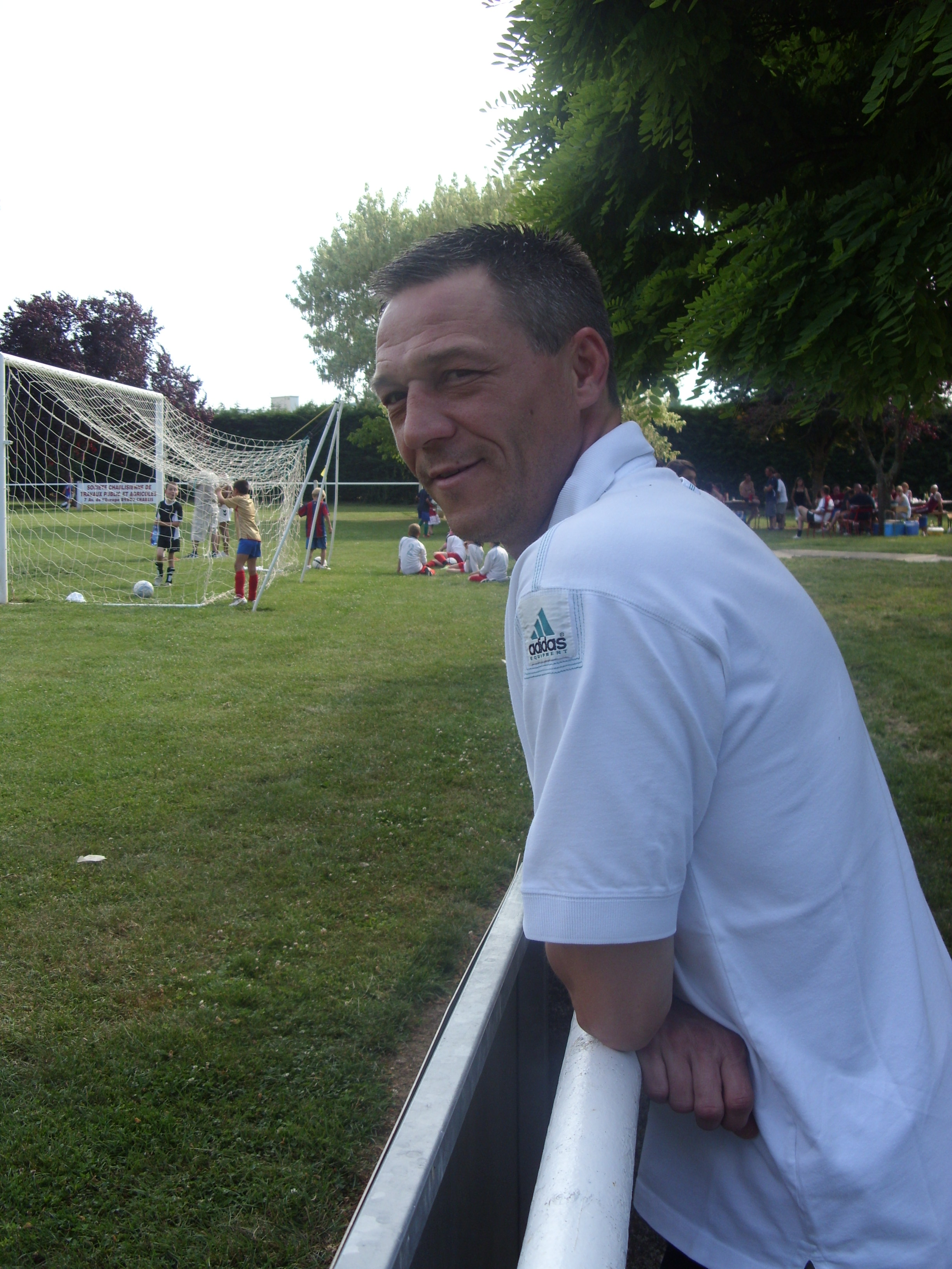 Photographie de Frédéric Darras à l'entrainement